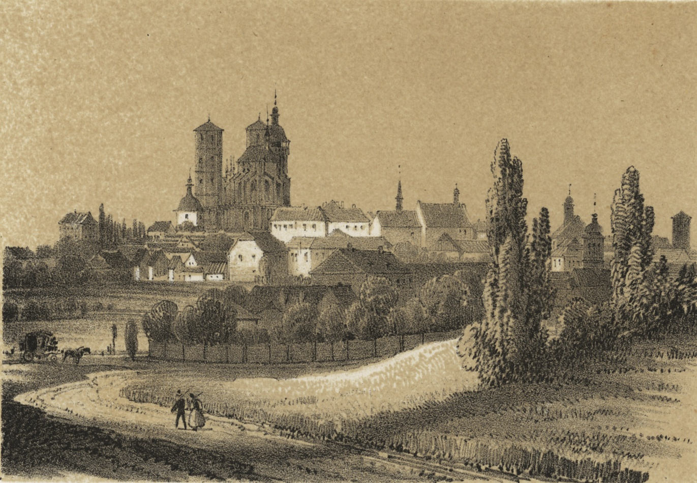 Kolín